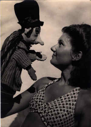 Clichet noir et blanc (1947) de Monique Créteur à 16 ans manipulant la marotte de "Lafouine", sculptée par Alphonse Réalier-Dumas (photo de Robert Desarthis), collection personnelle de Monique Créteur.